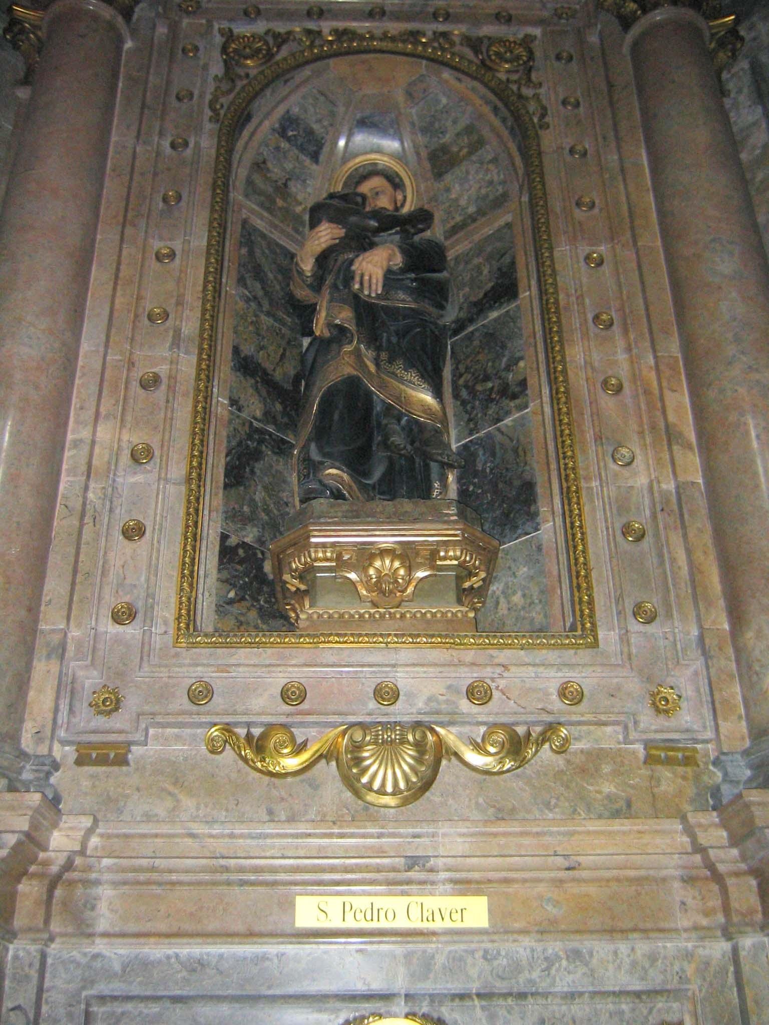 Detalle interior. San Pedro Claver. Santuario de Loiola, Azpeitia. Guipúzcoa, País Vasco (España).